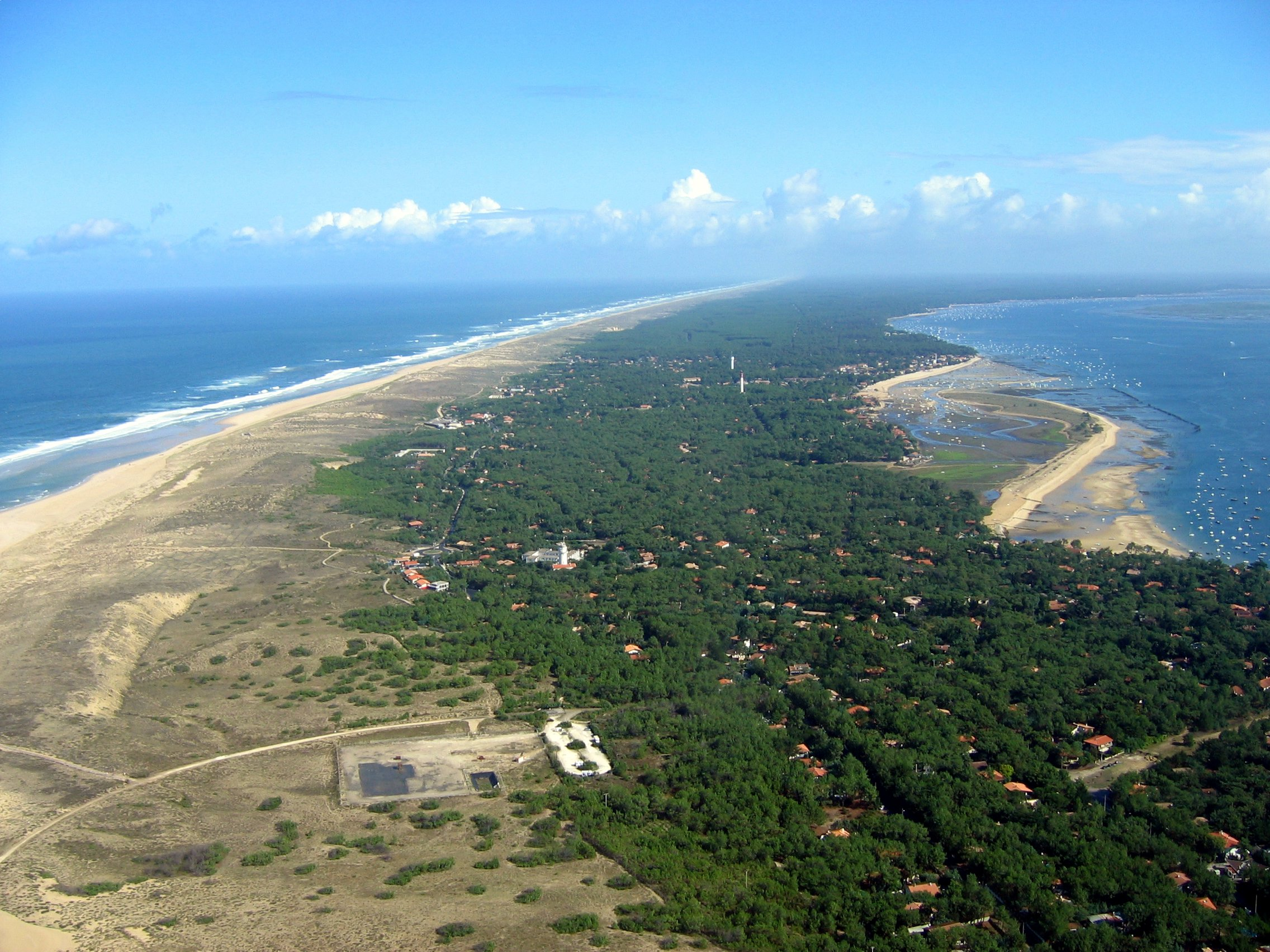 Le Cap Ferret vue du Sud vers le Nord le 13 août 2004.